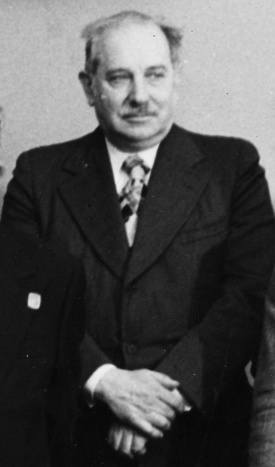 Józef Gierowski na jubileuszu 60-lecia (i 40-lecia pracy naukowej) prof. Henryka Zielińskiego na Uniwersytecie Wrocławskim